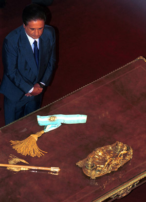 Eduardo Duhalde asume como presidente